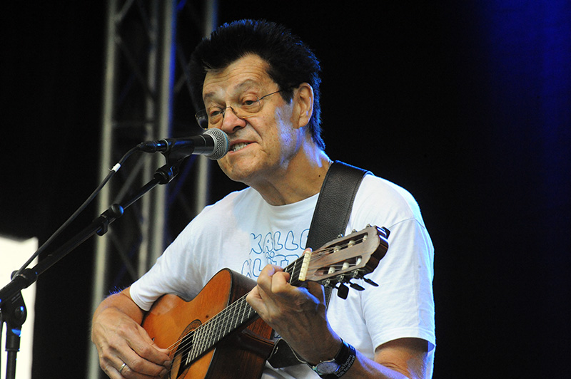 Jojje Wadenius at the 2014 Stockholm Folk Festival.